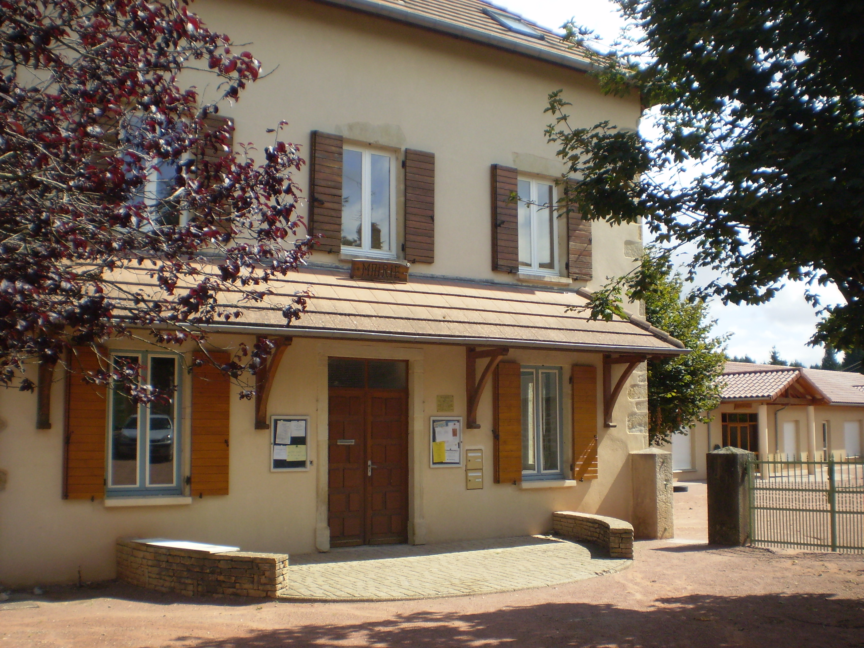 La Mairie du Village et sa place, elle se situe à proximité de l'école du village.